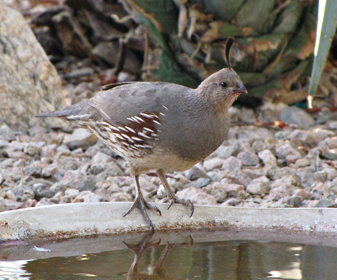 Callipepla gambelii Femail Gambel's Quail